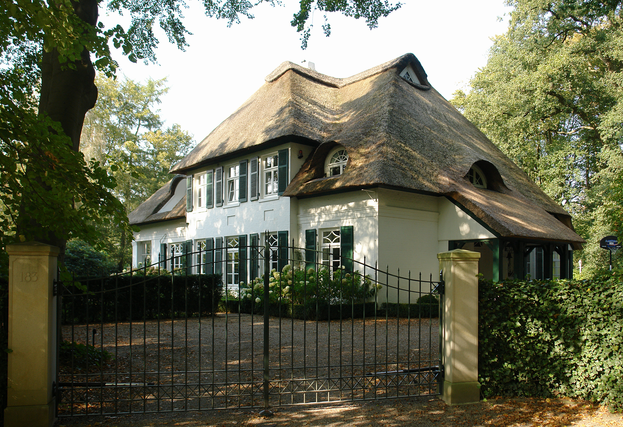 Haus Weyhausen in Bremen, Oberneulander Landstraße 183.Das abgebildete Objekt ist ein geschütztes Kulturdenkmal in der Freien Hansestadt Bremen, mit der Nr. 0952 beim Landesamt für Denkmalpflege registriert.